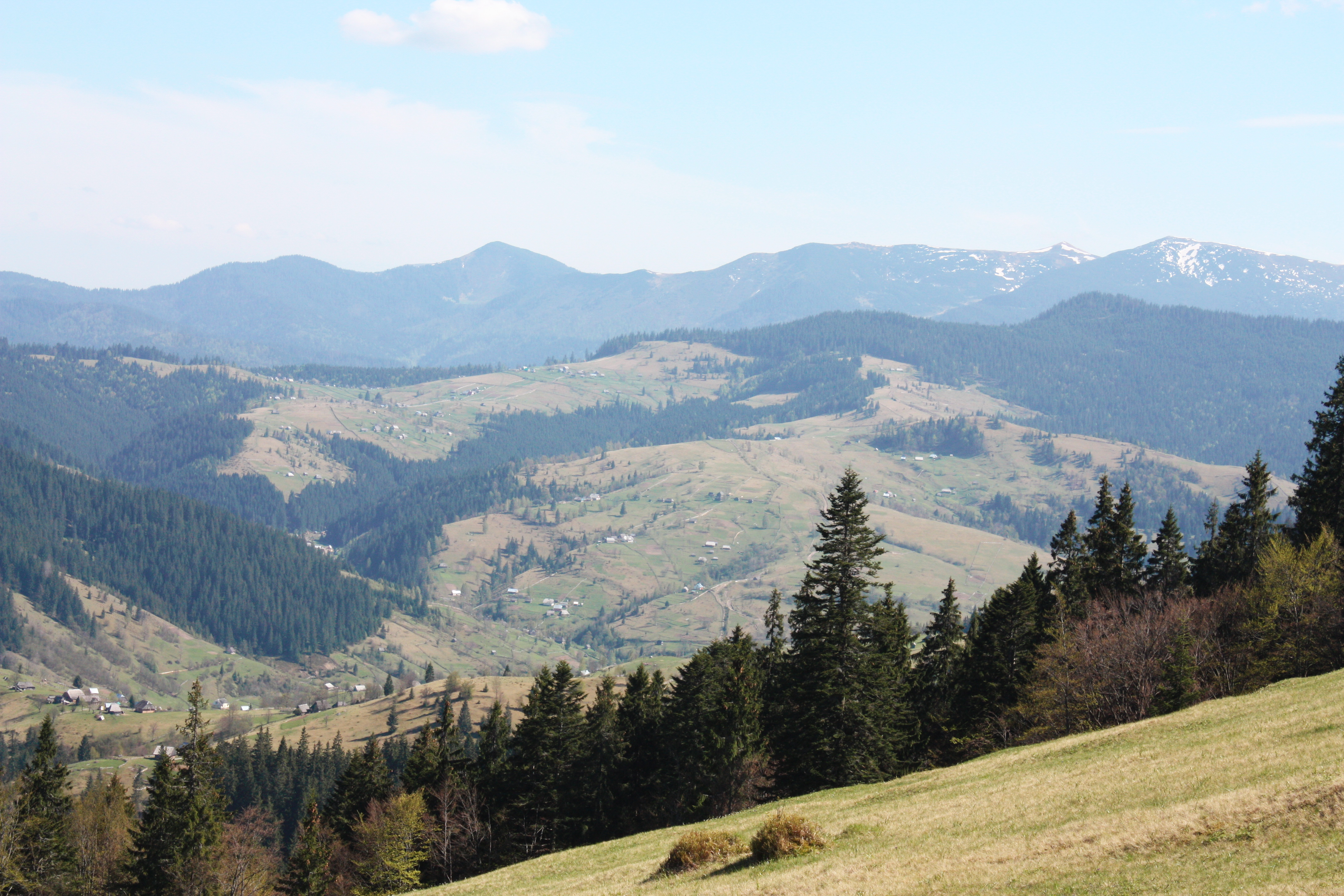 НПП** «Синевир», Міжгірський, Хустський райони